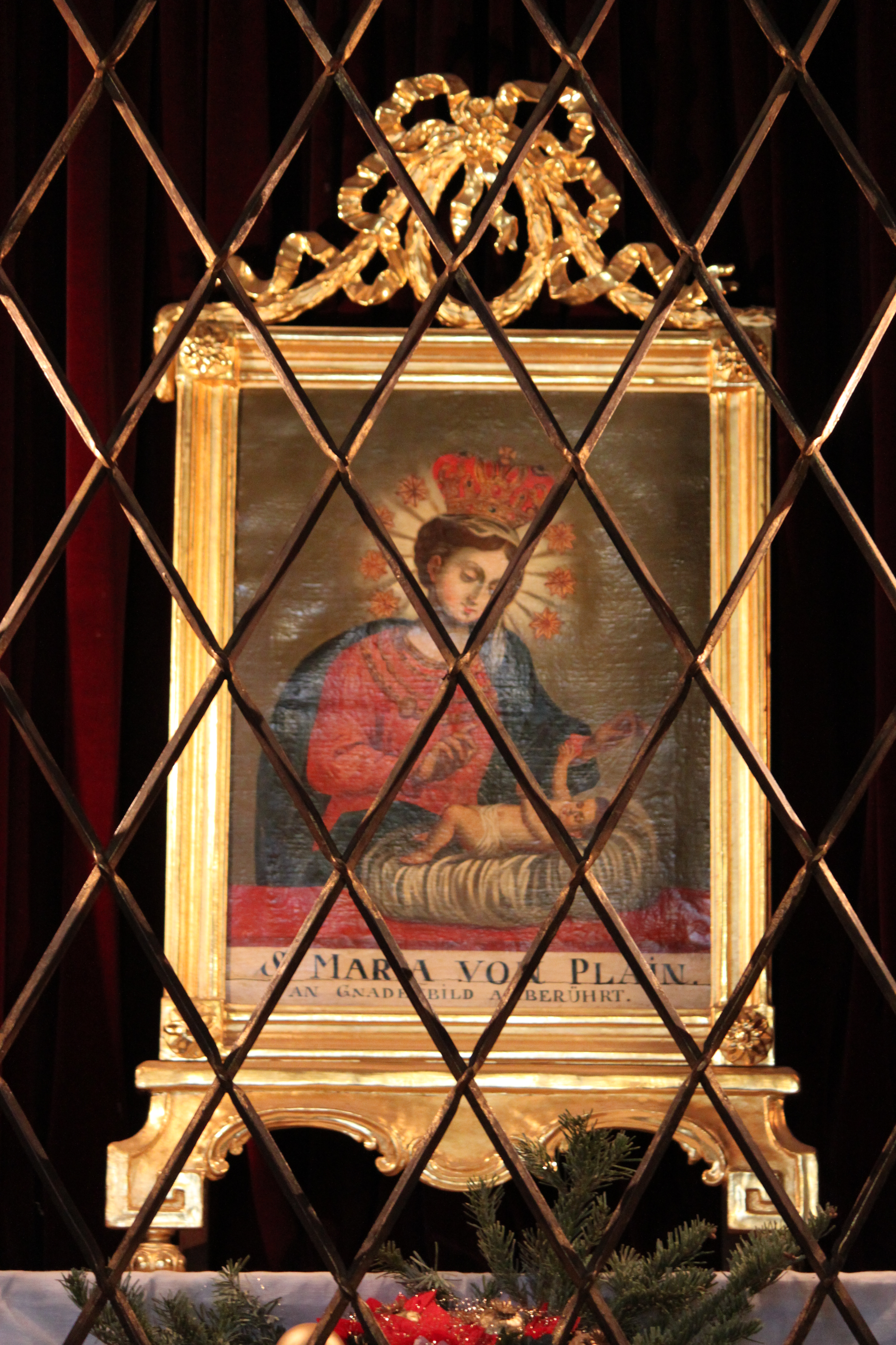 Kath. Filialkirche, Bürgerspitalskirche hl. Blasius